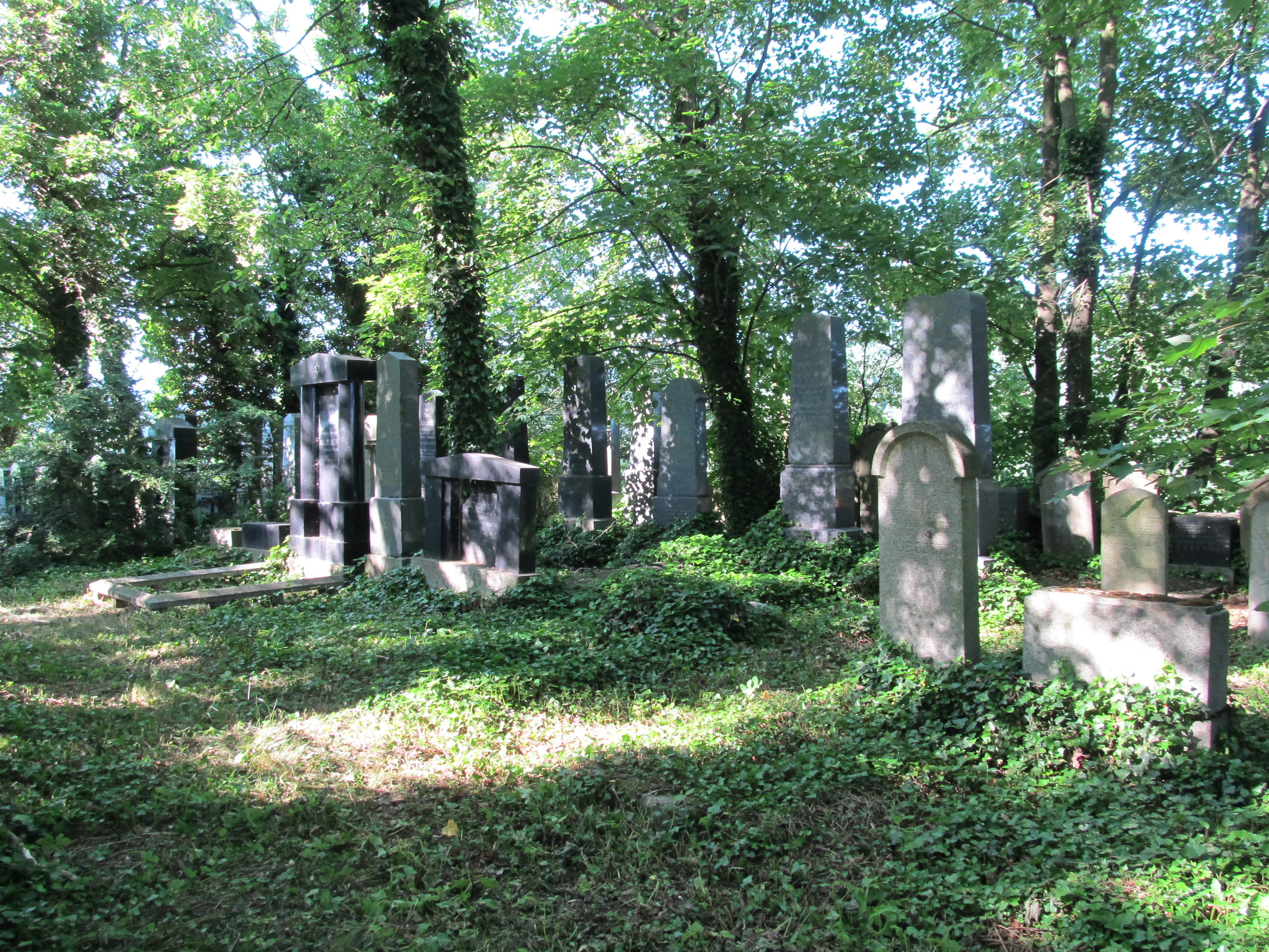 Nýrsko 06 ŽH